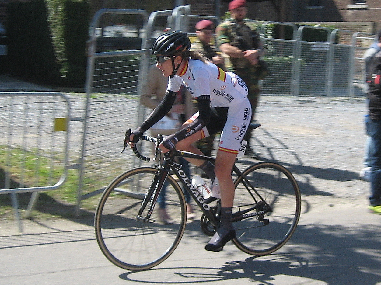 Anna Sanchis (Wiggle High5) in Waalse Pijl 2016